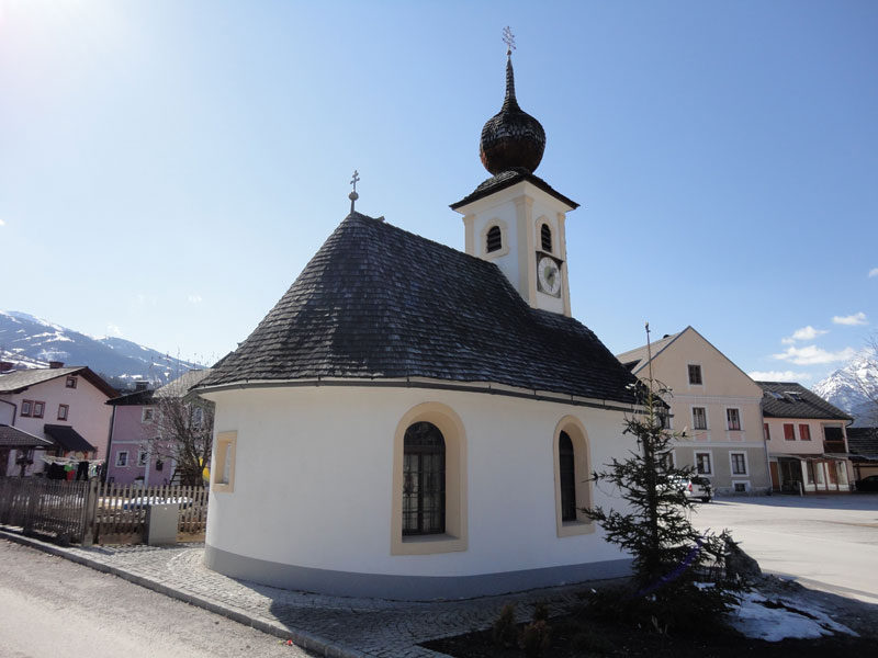 Denkmalgeschützte Messkapelle in Aich